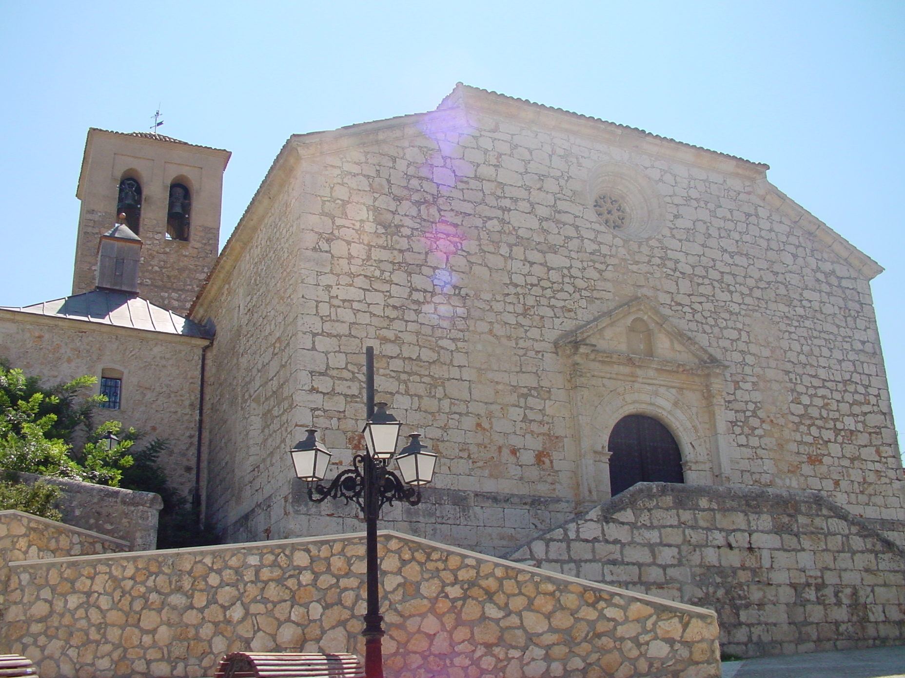 Iglesia en Villalbilla.